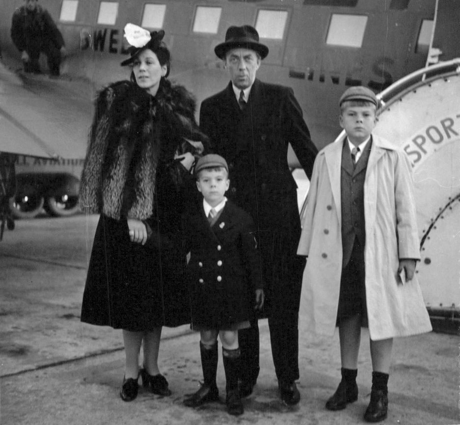 Greven och grvinnan Bernadotte af Wisborg jämte småttingar anlände programenligt med flyg på lördagskvällen vid 19-tiden till Stockholm. Greve Bernadotte berättar att resan för grevinnan och barnen, som startade i New York på tisdagsmorgonen, hela vägen gått med flyg. Greve Bernadotte mötte sin familj i Berlin på fredagskvällen och det enda obehag man hade under vistelsen i Tysklands huvudstad var ett flyglarm, som varade ungefär tre ...